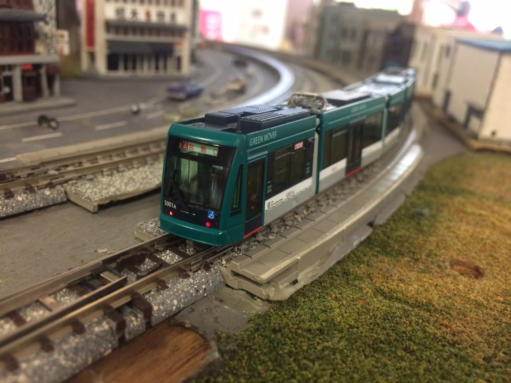 広電5000